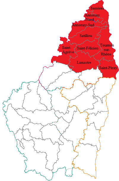 Deuxième circonscription législative de l'Ardèche